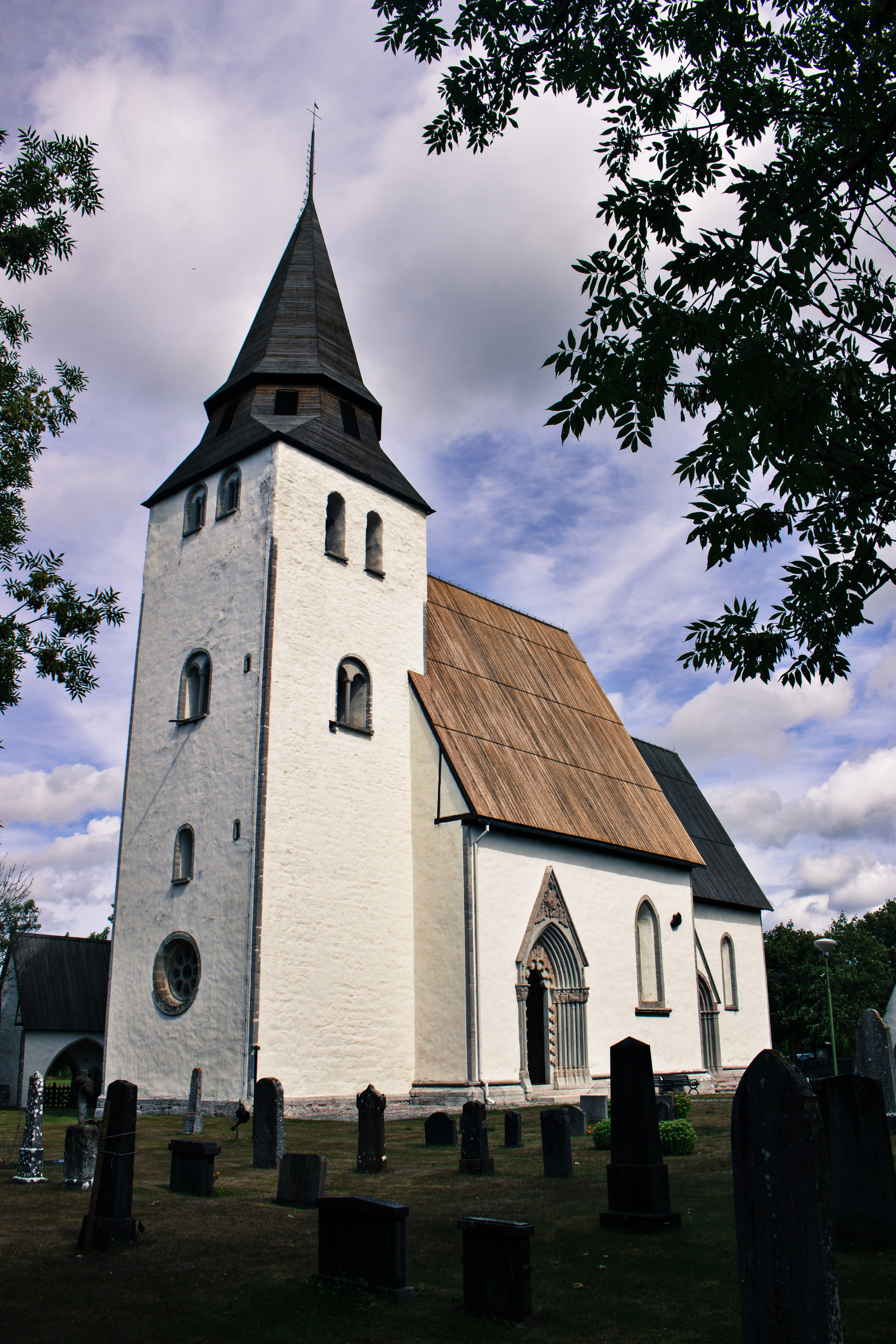 Igrexa de Norrlanda, Gotland.